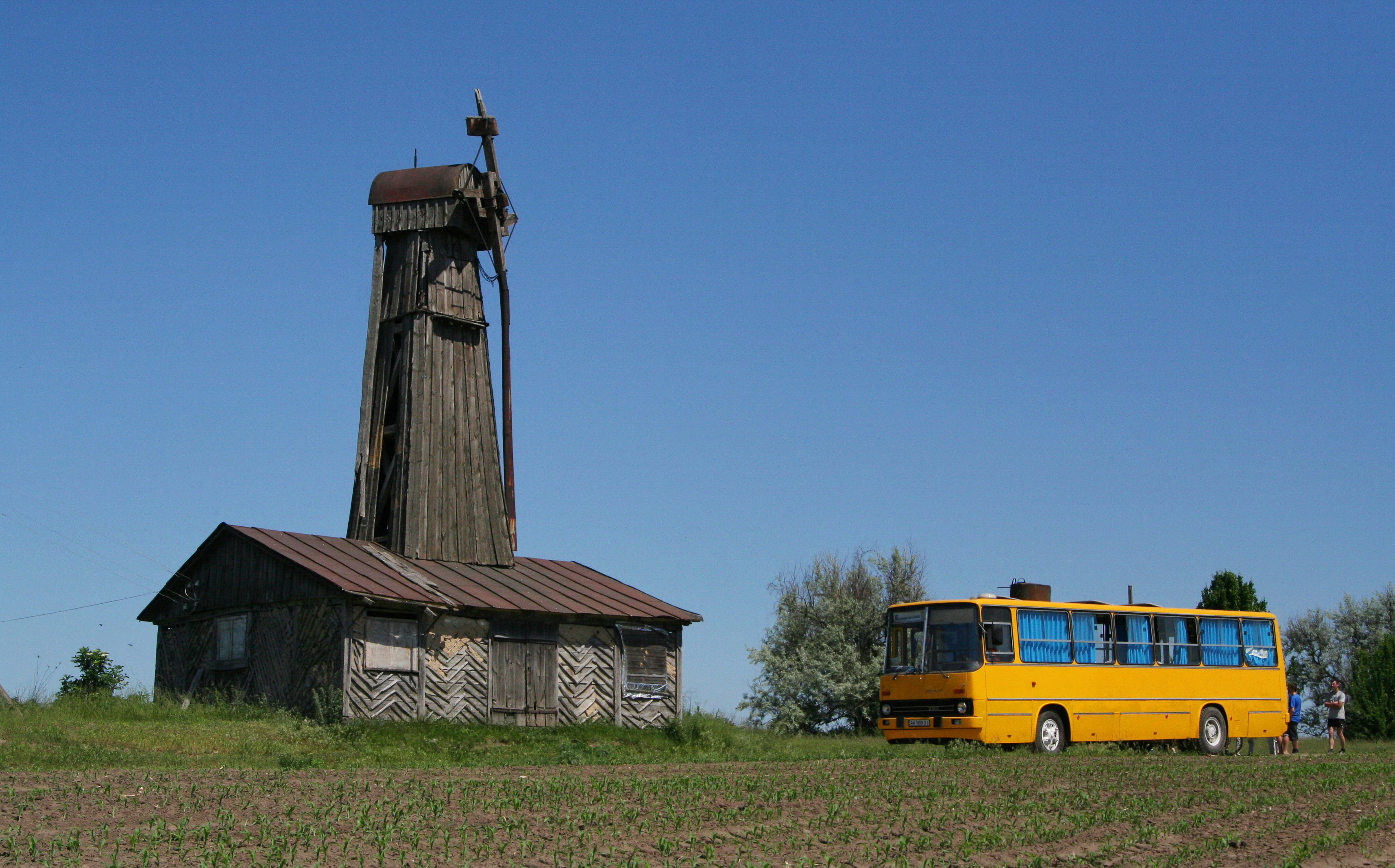 Вітряк (дер.), с. Грищенці